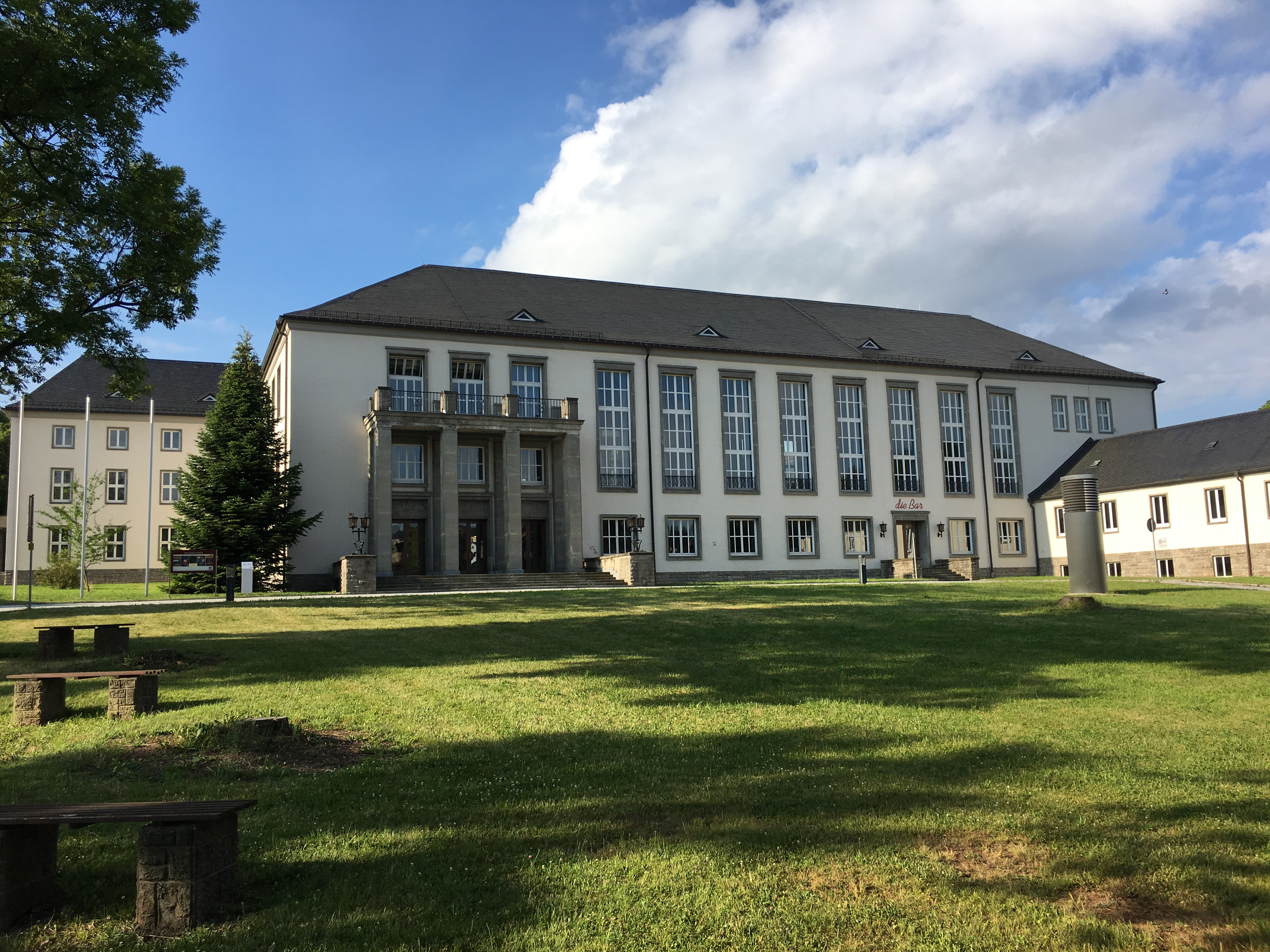 Ehemaliges Klubhaus der Bergarbeiter in Oelsnitz Erzgebirge Kulturhaus Hans Marchwitza, heute Stadthalle Oelsnitz.jpg